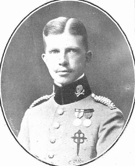 Fotografía del infante Fernando de Baviera publicada en 1914 con motivo del anuncio de su compromiso matrimonial con María-Luisa Silva-Bazán y Fernández de Henestrosa